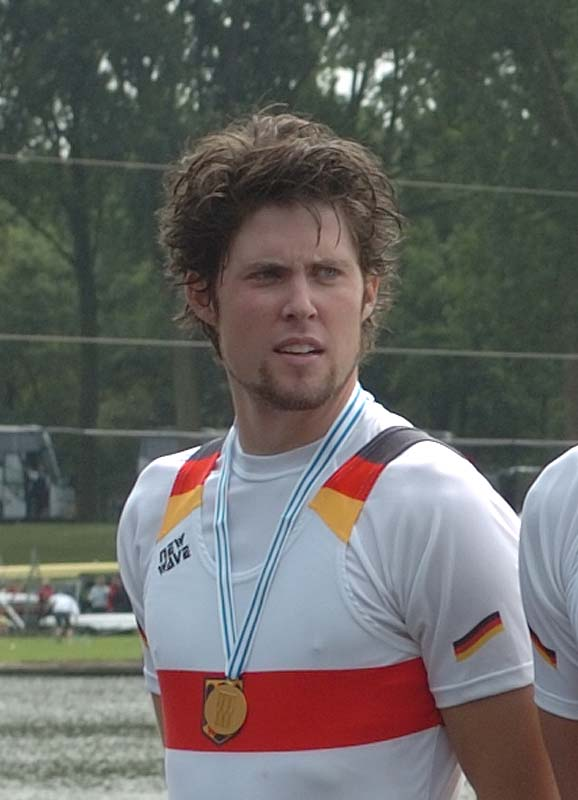 Richard Nagel bei U23 WM in Amsterdam